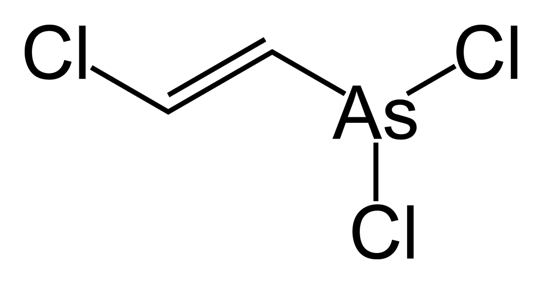 Lewisite-skeletal